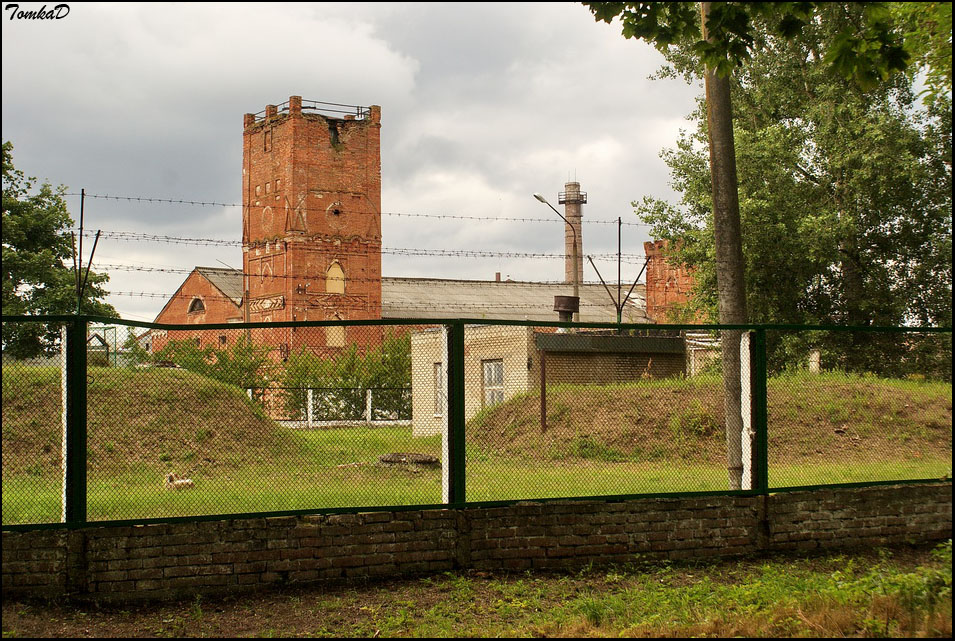 Нароўля. Чырвоны Мазыранін